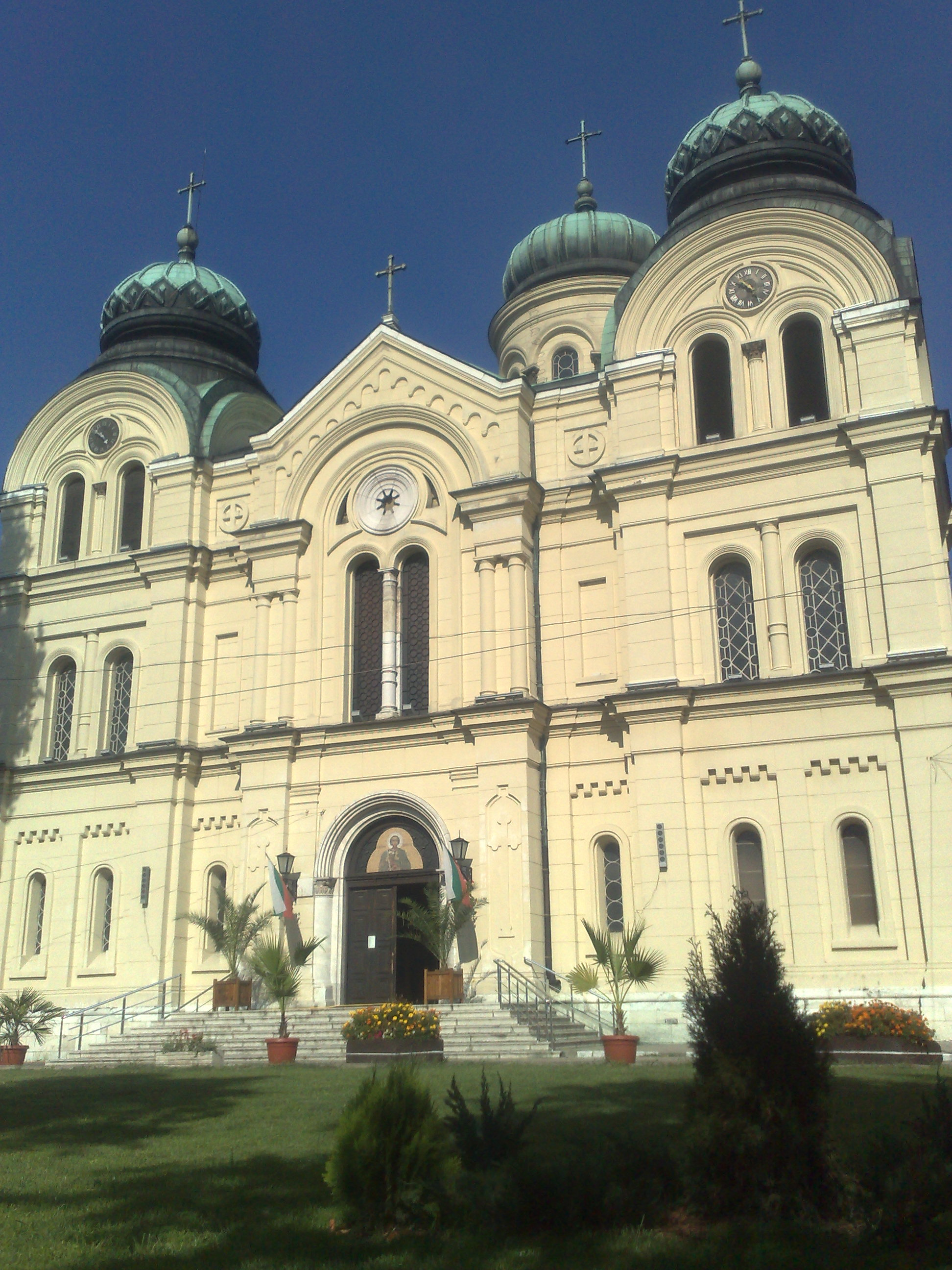 Катедрален храм "Св. вмчк Димитър Солунски" гр. Видин